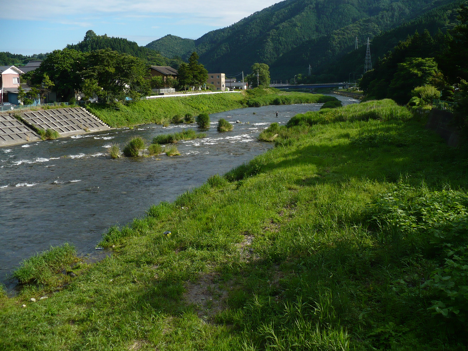 kesenriver001